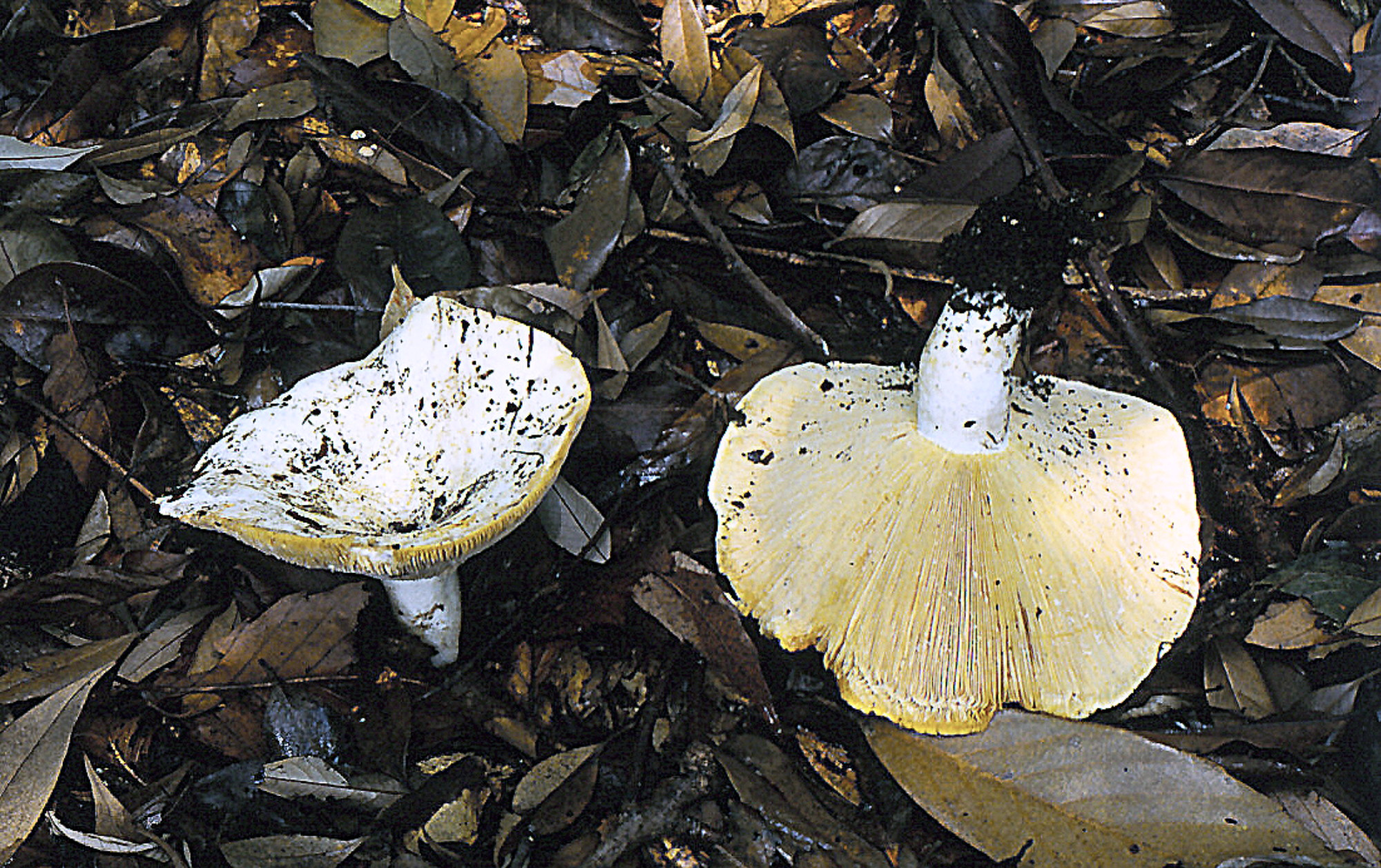 Russula japonica 1996 0922 (Japon) シロハツモドキ Fausse russule sans lait (faux lactaire blanc)